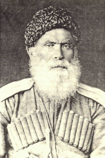 Ирон: Хетӕгкаты Къостайы фыд Леуан.